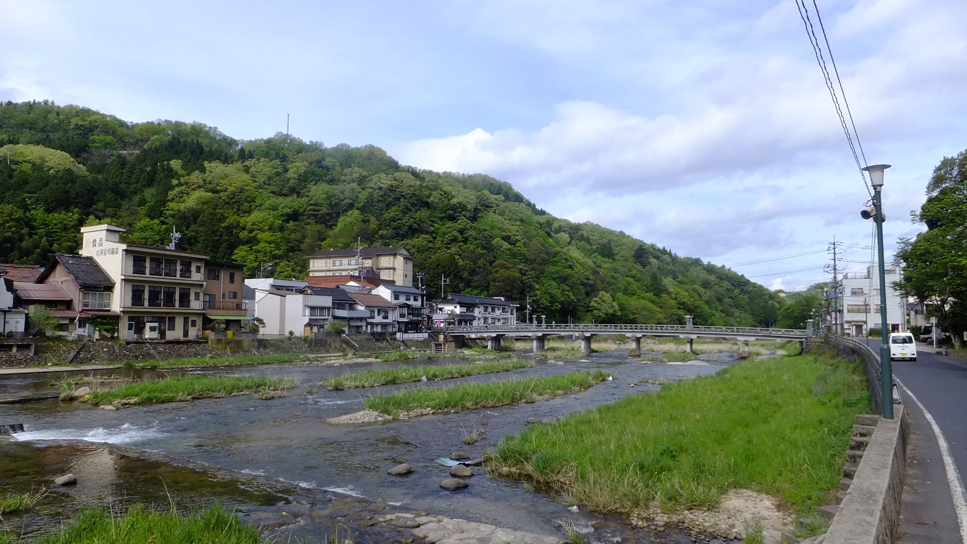 鳥取県東伯郡三朝町三朝 三徳川